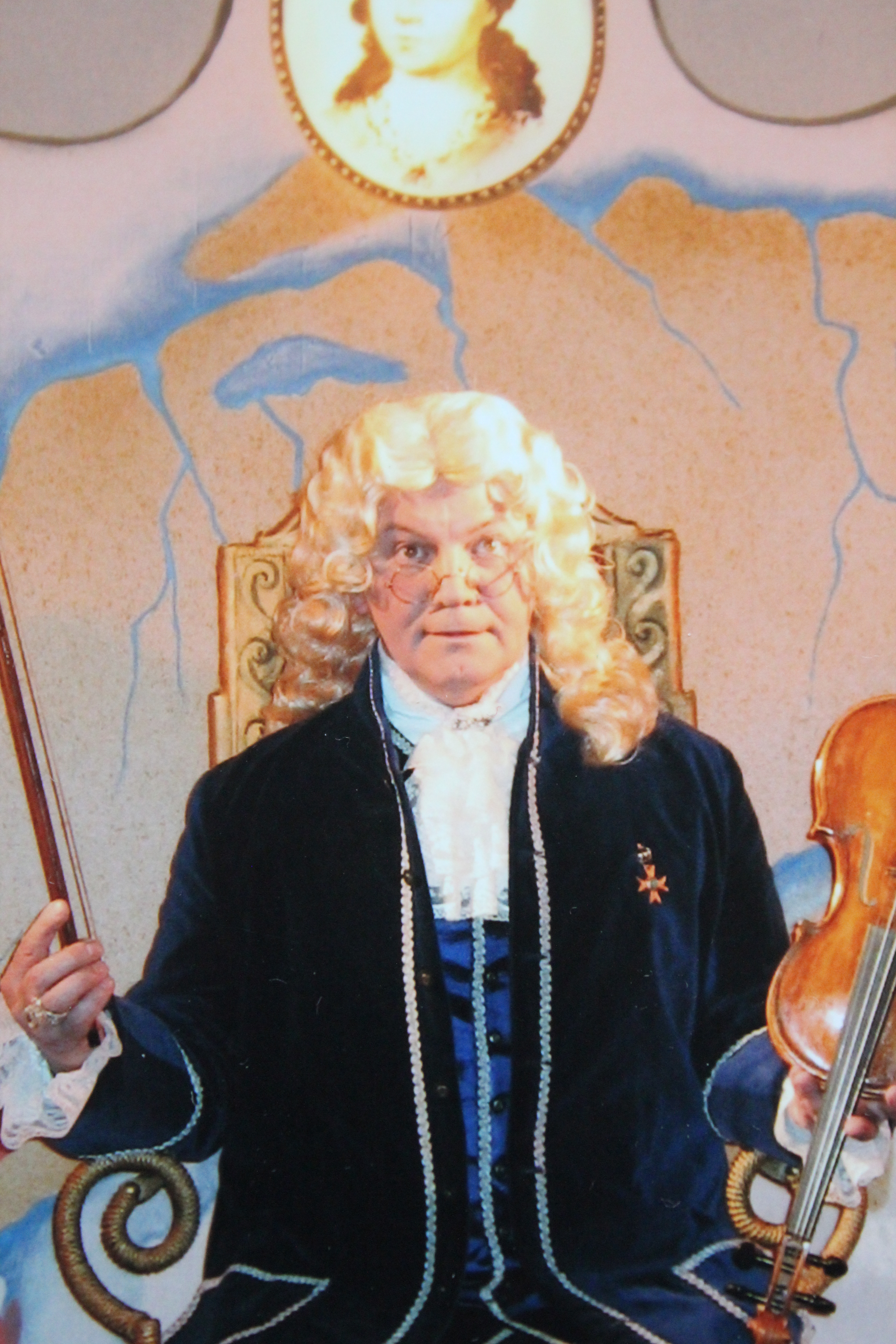 Сцена из спектакля «Любовь и смерть. Мужчины Екатерины Великой» Санкт-Петербургского драматического театра «Патриот» РОСТО. В роли Петра Третьего Геннадий Егоров. Режиссёр-постановщик Геннадий Егоров.